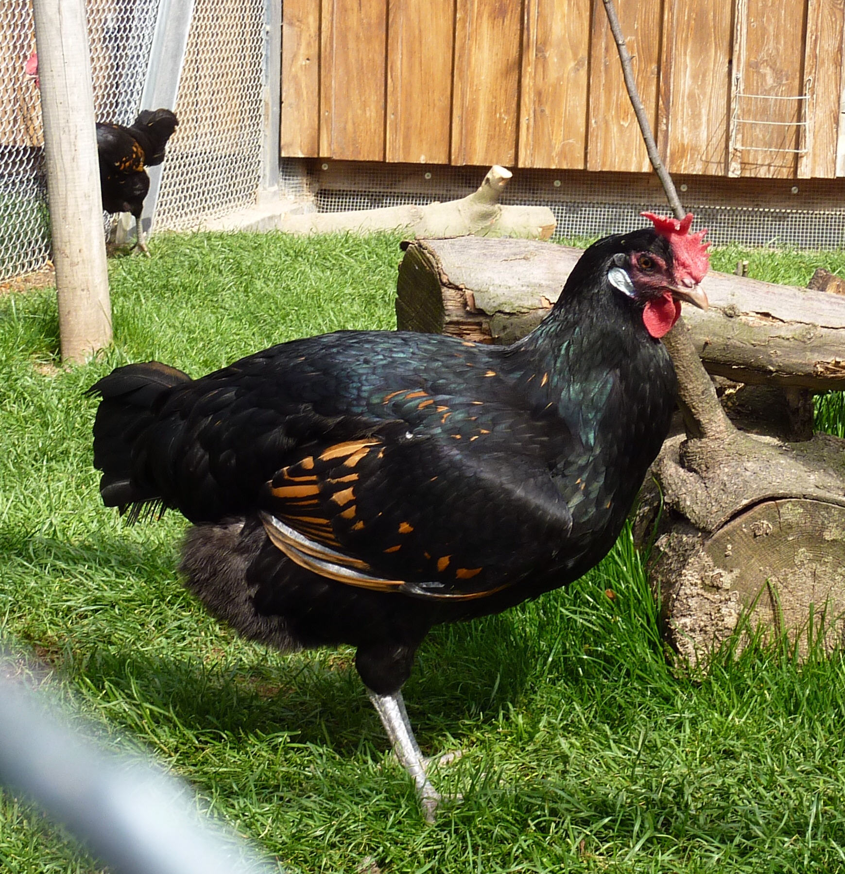 im Schaubauernhof der Wilhelma